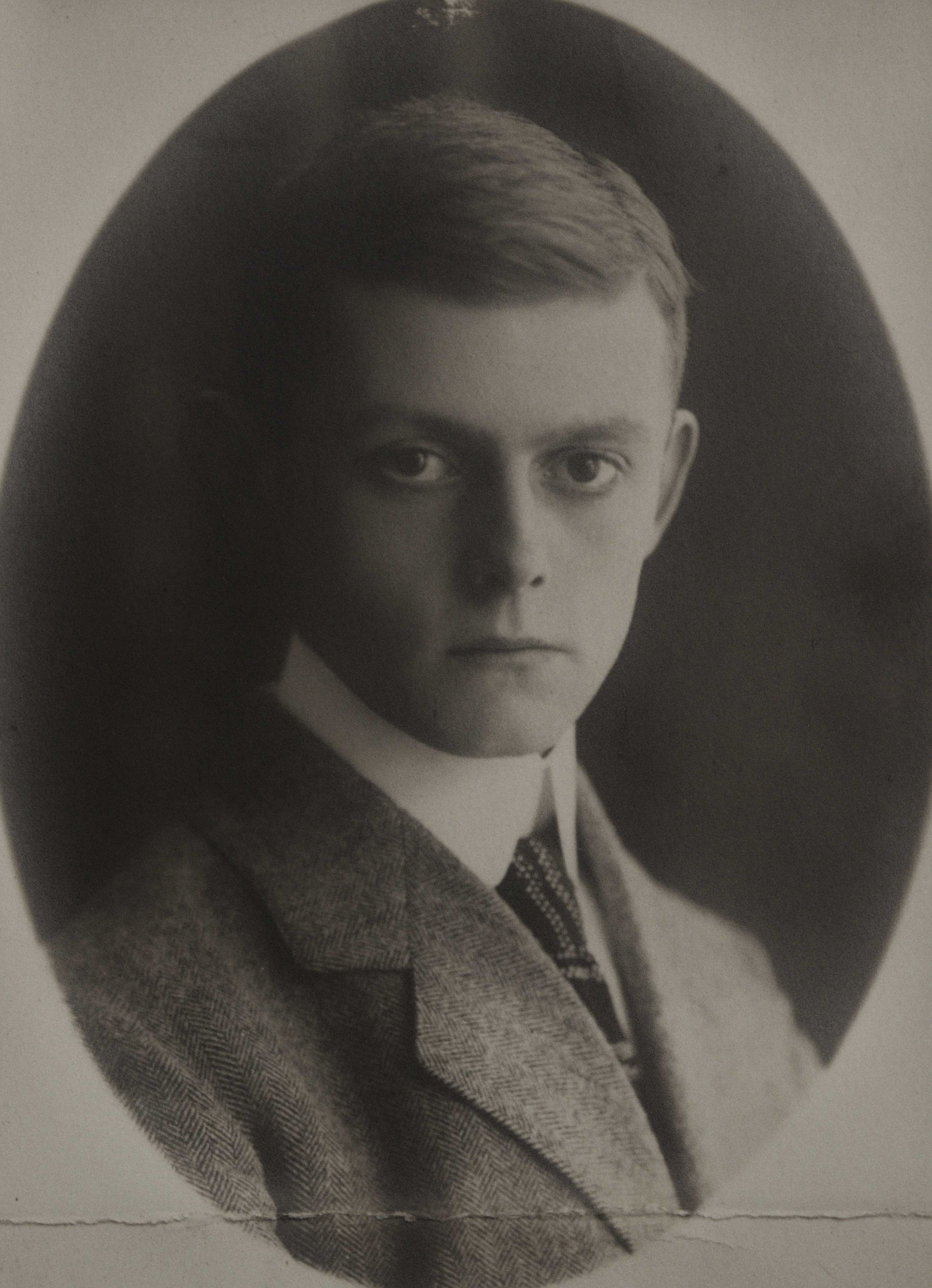 Fotografie von Hermann Krause als Mitglied der Studentenverbindung Leonensia in Heidelberg. Standort: Ahnengalerie im Conventssaal der Leonensia.